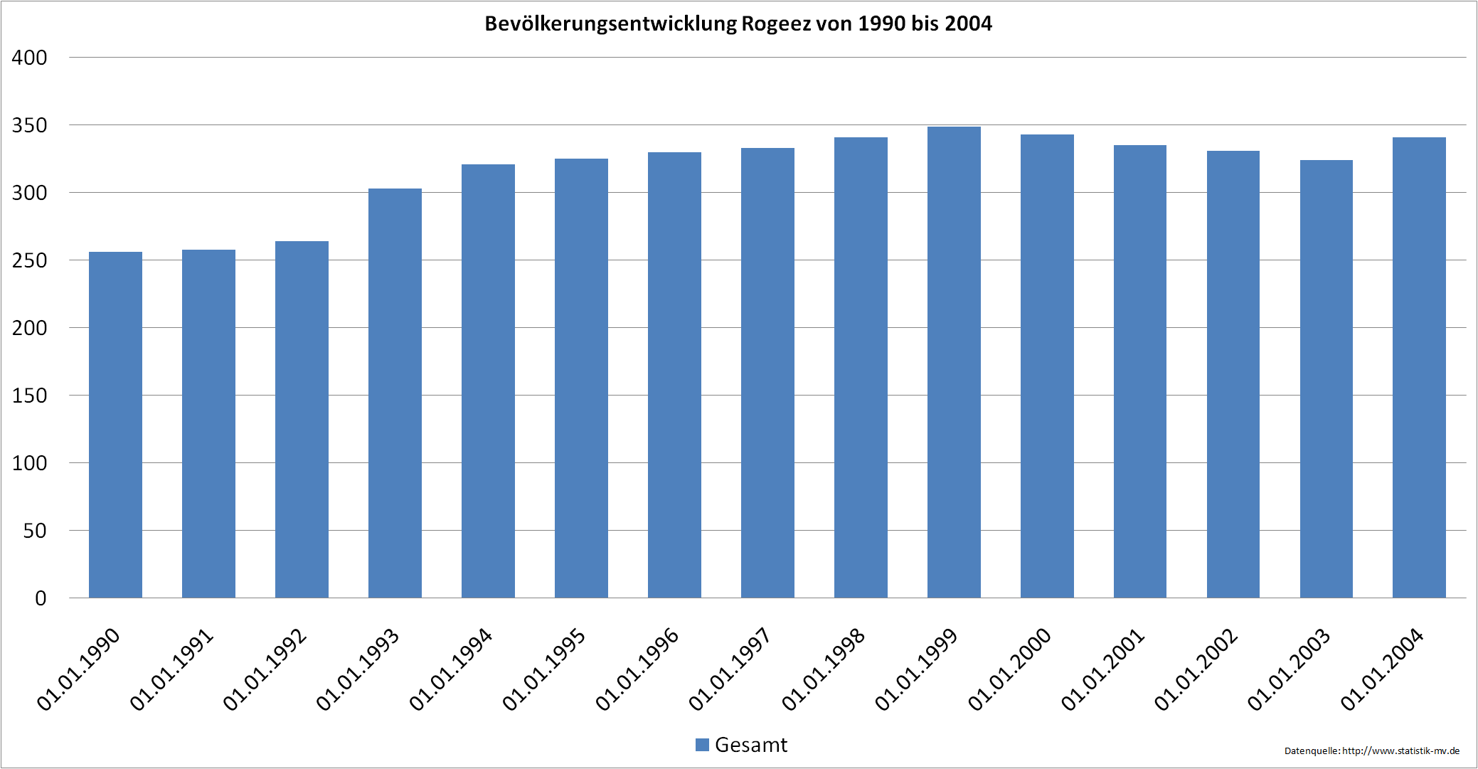 Bevölkerungsentwicklung seit der Wende 1990 bis zur Gemeindezusammenlegung 2004